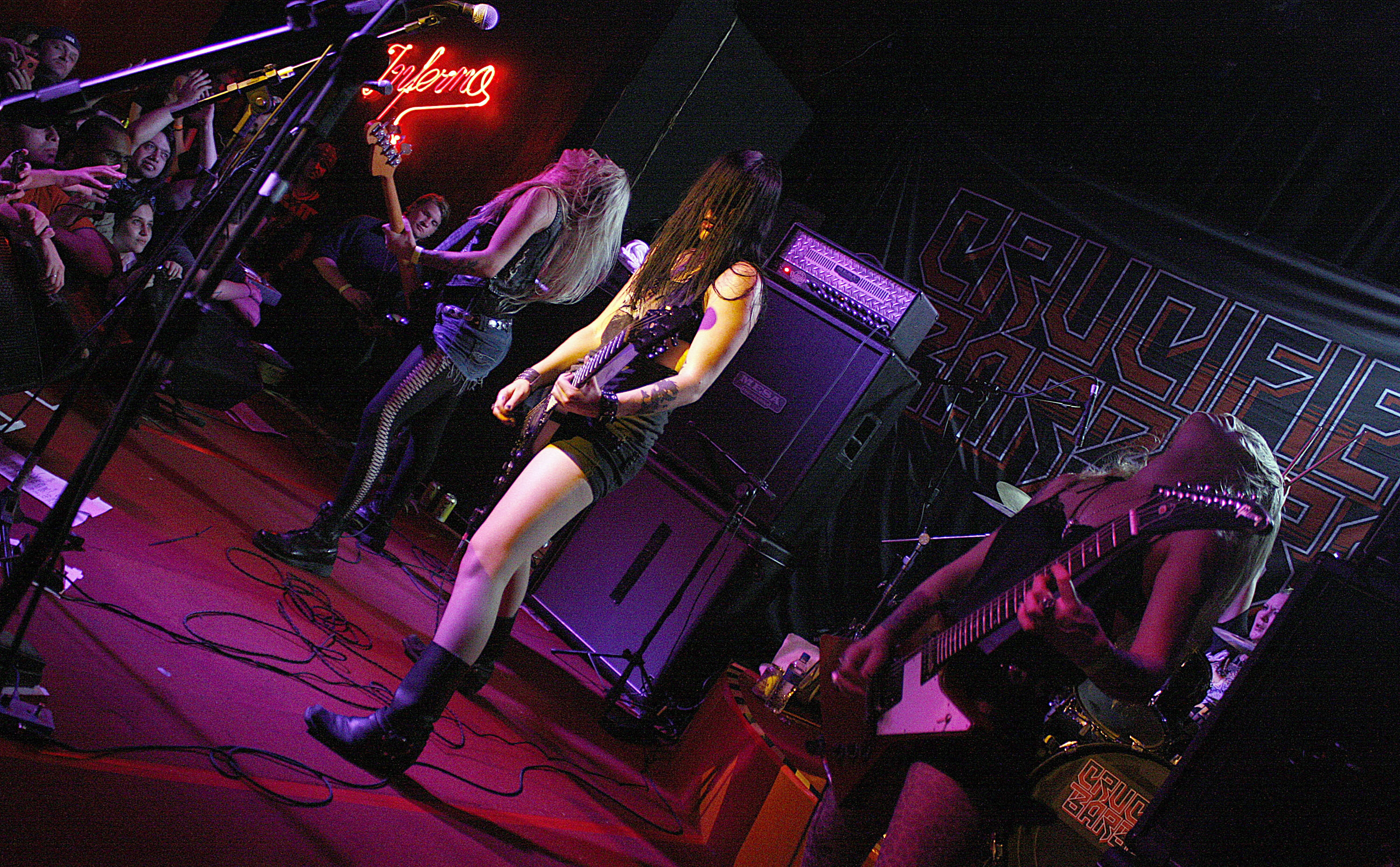 Crucified Barbara au Inferno Club de Sao Paulo en 2012